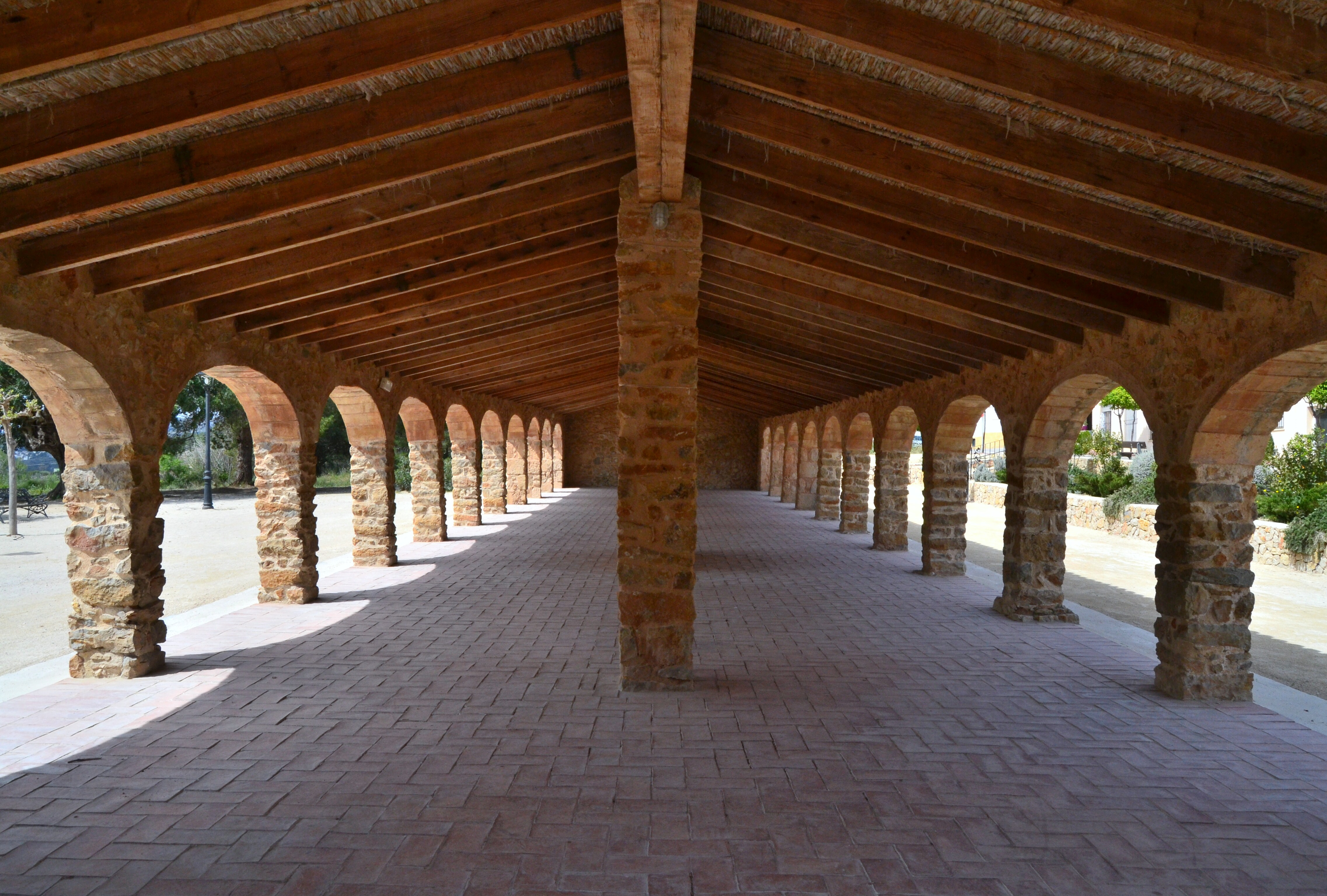 Interior del riurau gran de Jesús Pobre.